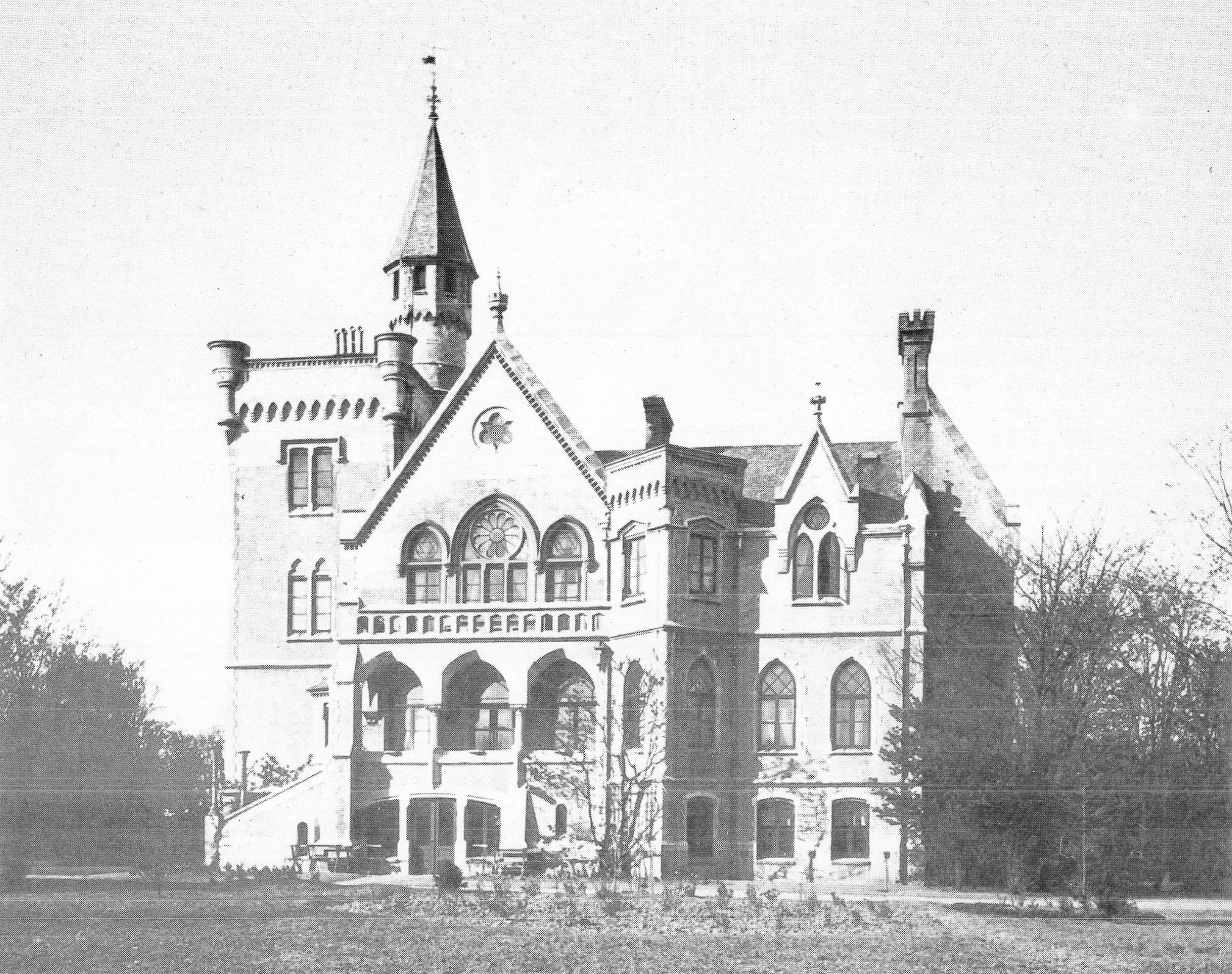 Tuna slott. Foto Lina Jonn 1894/Kulturen.